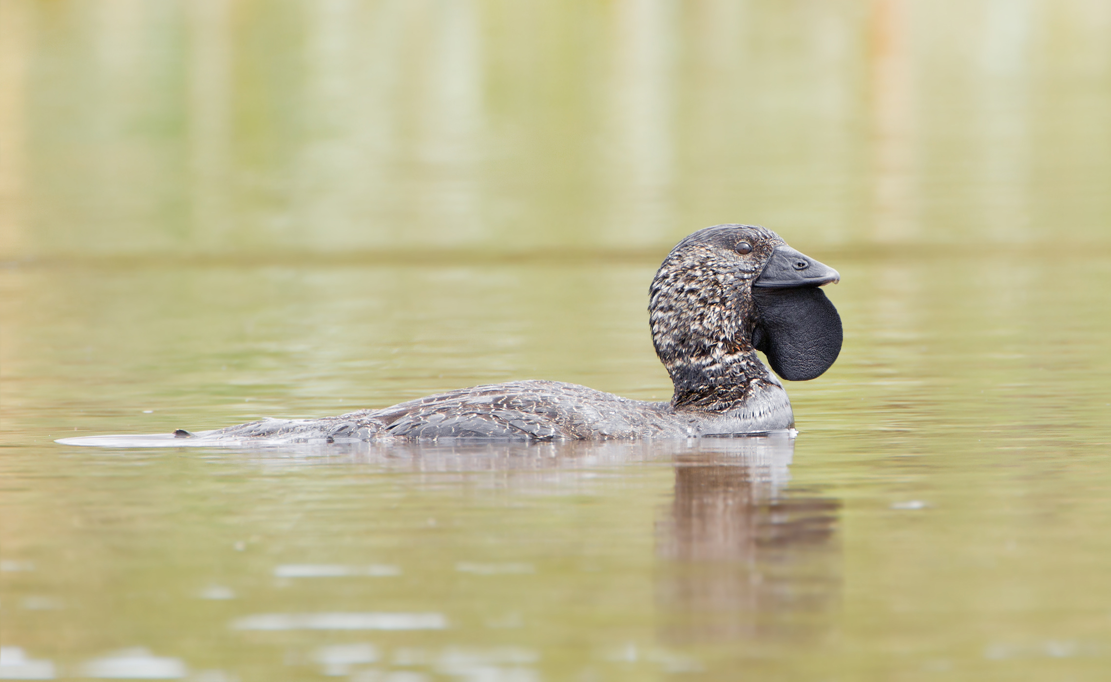 Musk Duck (Biziura lobata) male, Sandford, Tasmania, Australia